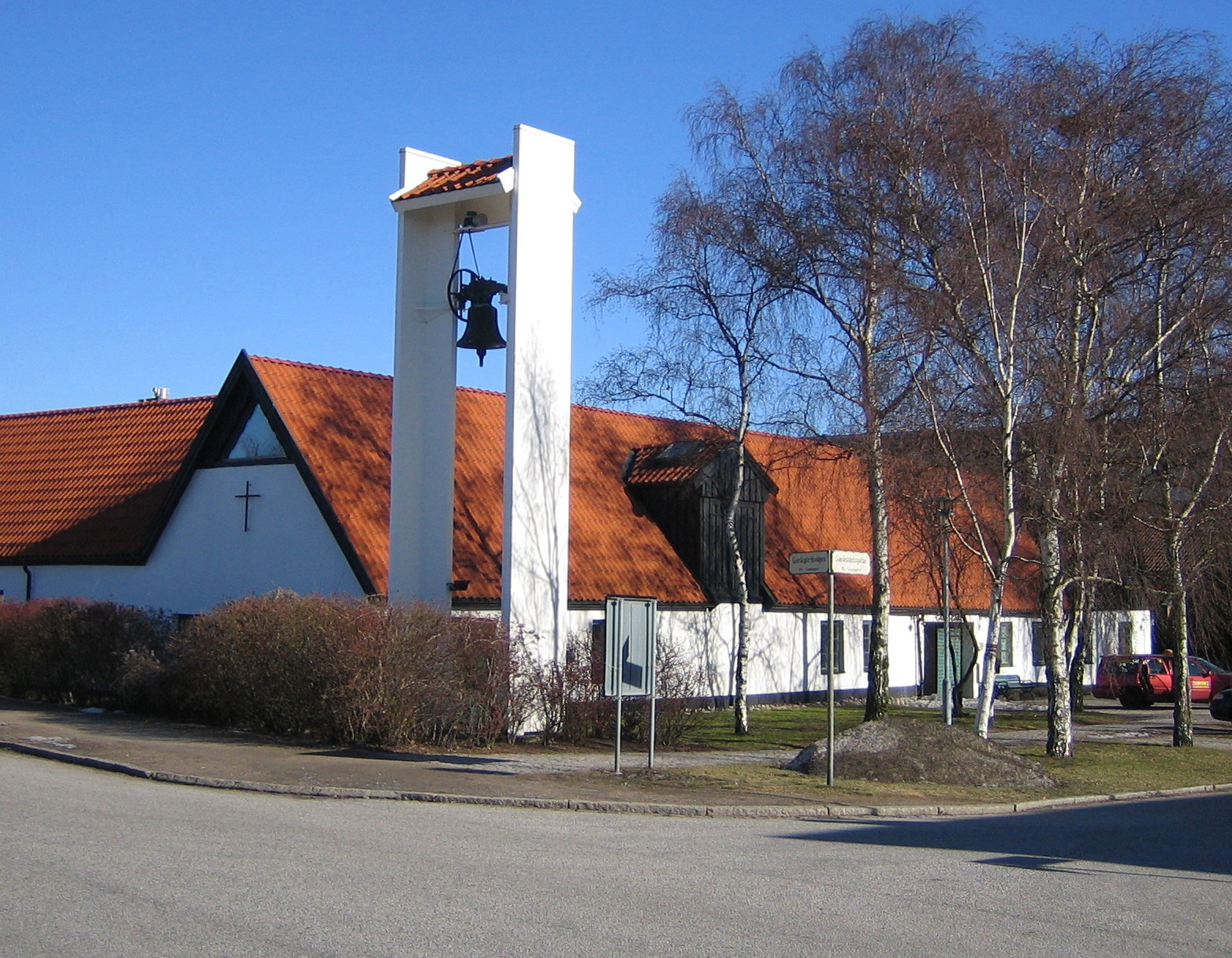 Hyllie kyrka